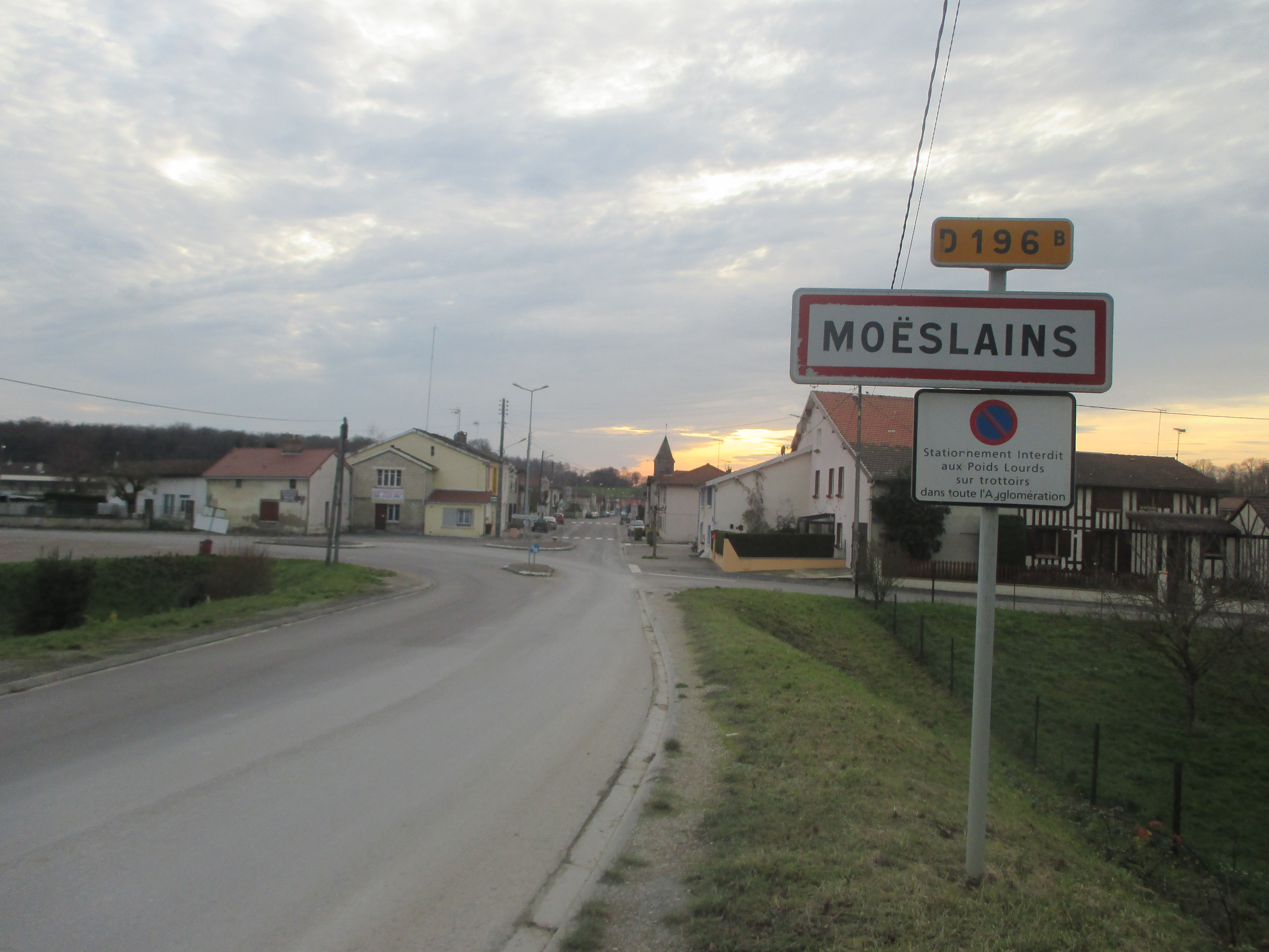 C'est le panneau de Moeslains